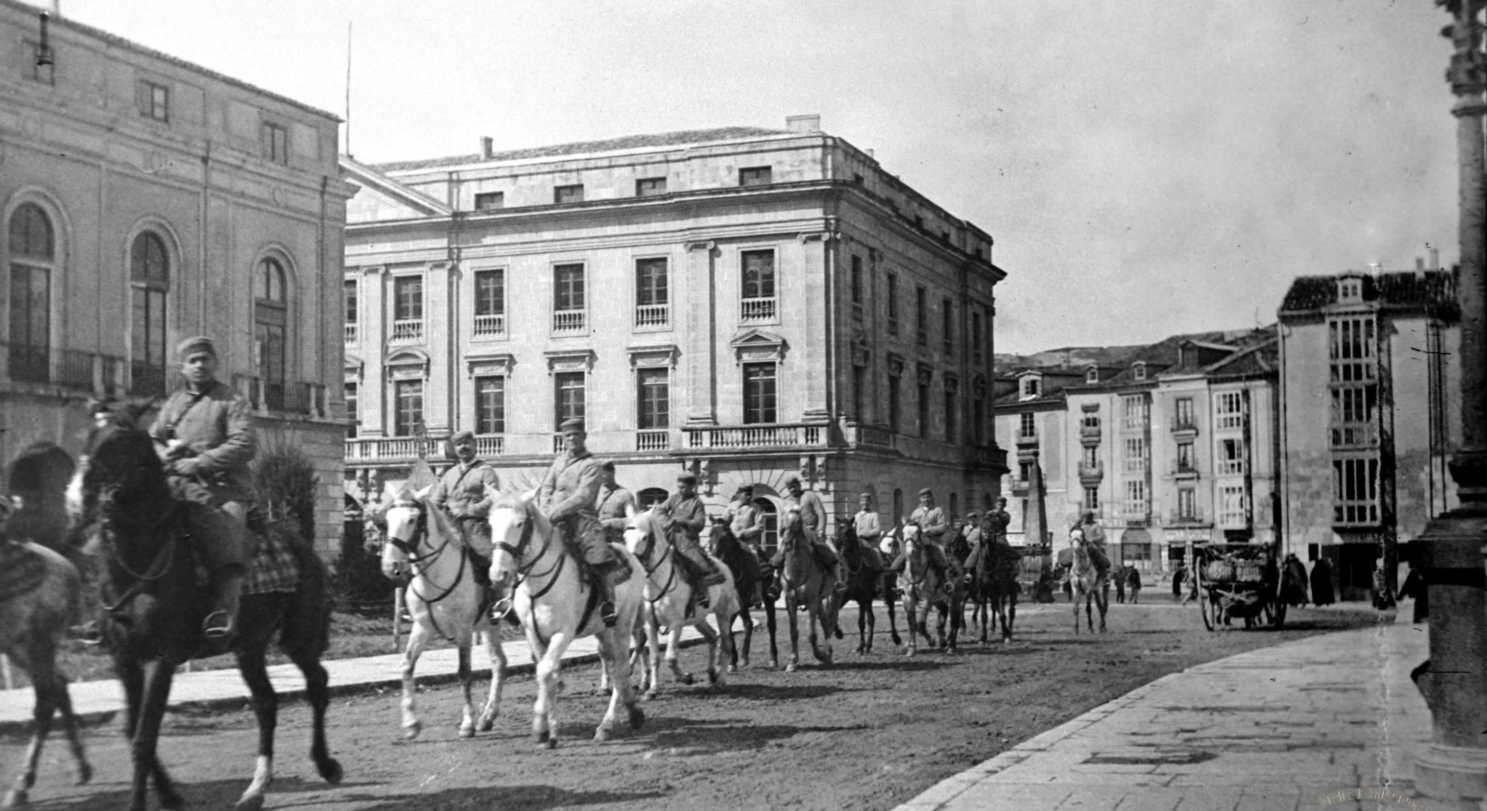 Caballeria en traje de faena en el puente de San Pablo de Burgos, España, a finales siglo XIX.